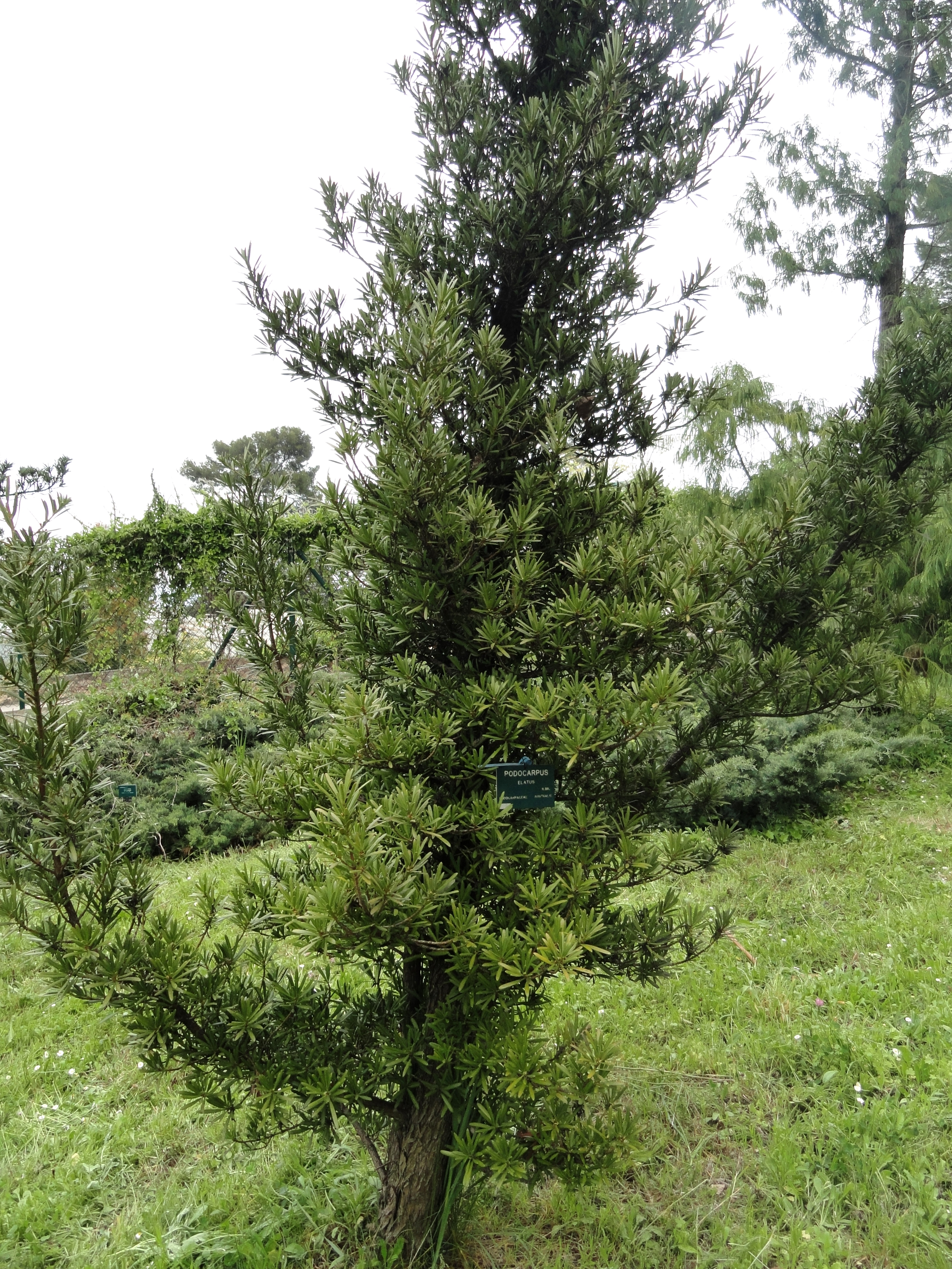 Podocarpus elatus specimen in the Jardin botanique de la Villa Thuret, Antibes Juan-les-Pins, Alpes-Maritimes,France.